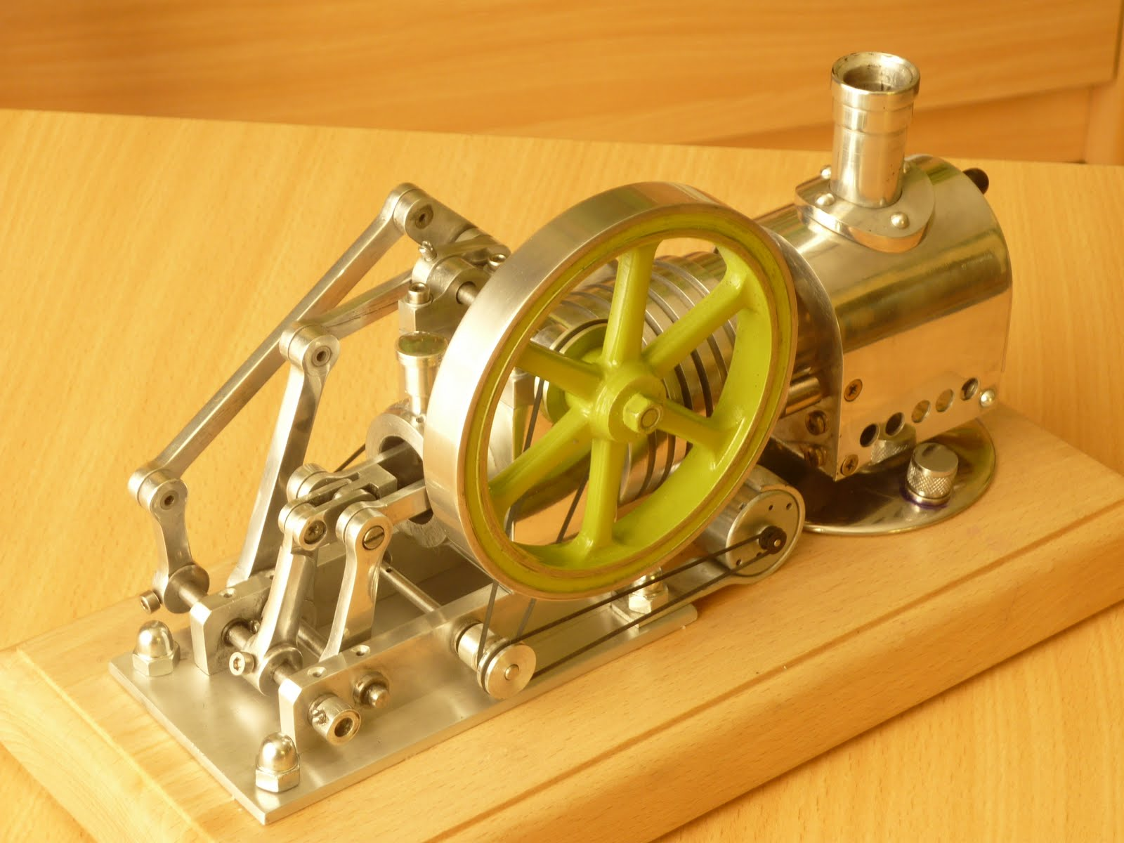 SIlnik Stirlinga typu Lehmann